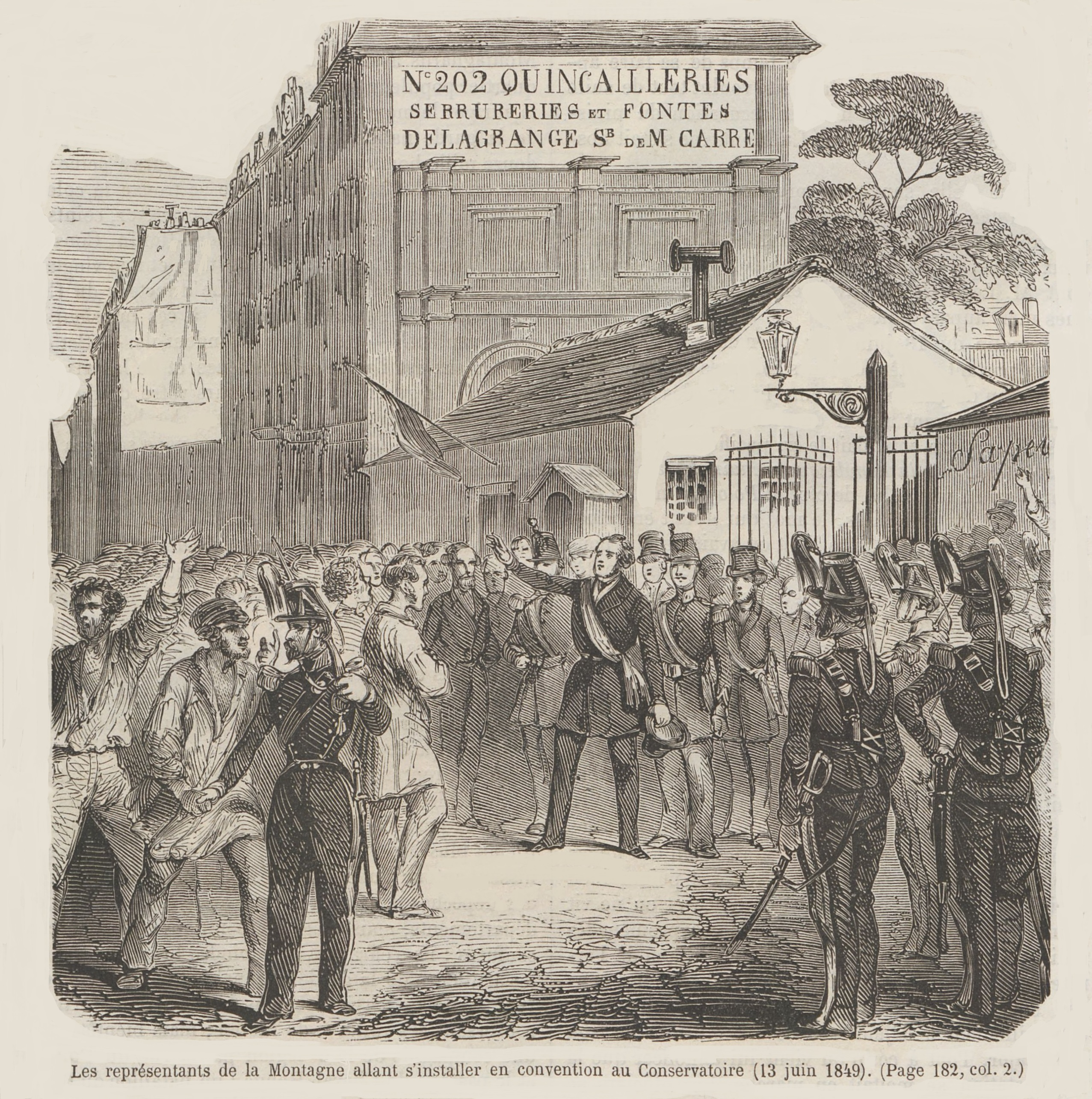 Les représentants de la Montagne allant s'installer en convention au Conservatoire (13 juin 1849). Gravure extraite de l'ouvrage de Victor Duruy, Histoire populaire contemporaine de la France, Tome deuxième, Paris, Lahure, 1865, p. 181.